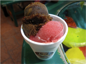 fotografía de nieves de sabores